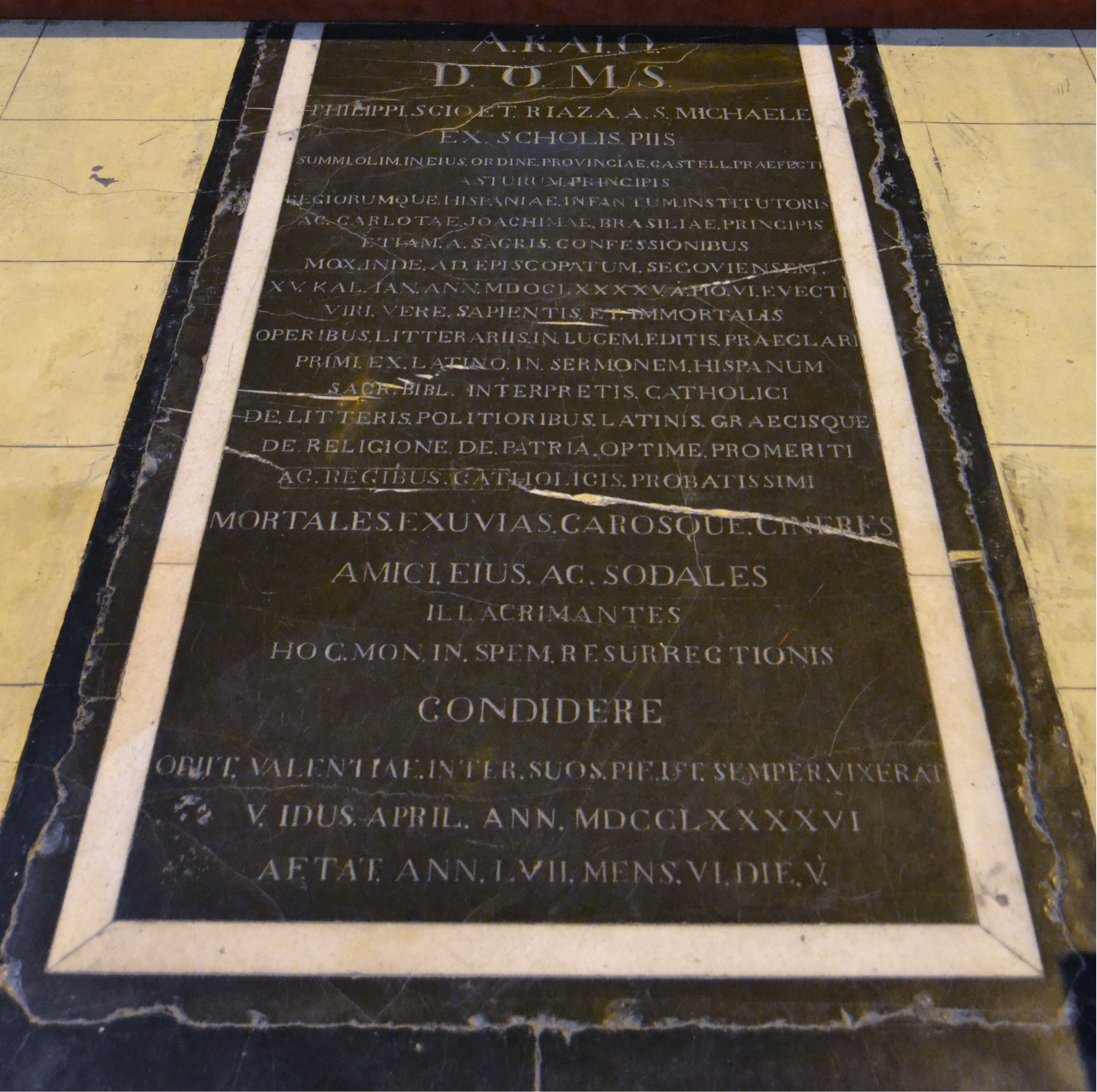 Tomba de Felipe Scío de San Miguel, església de les escoles Pies, València.